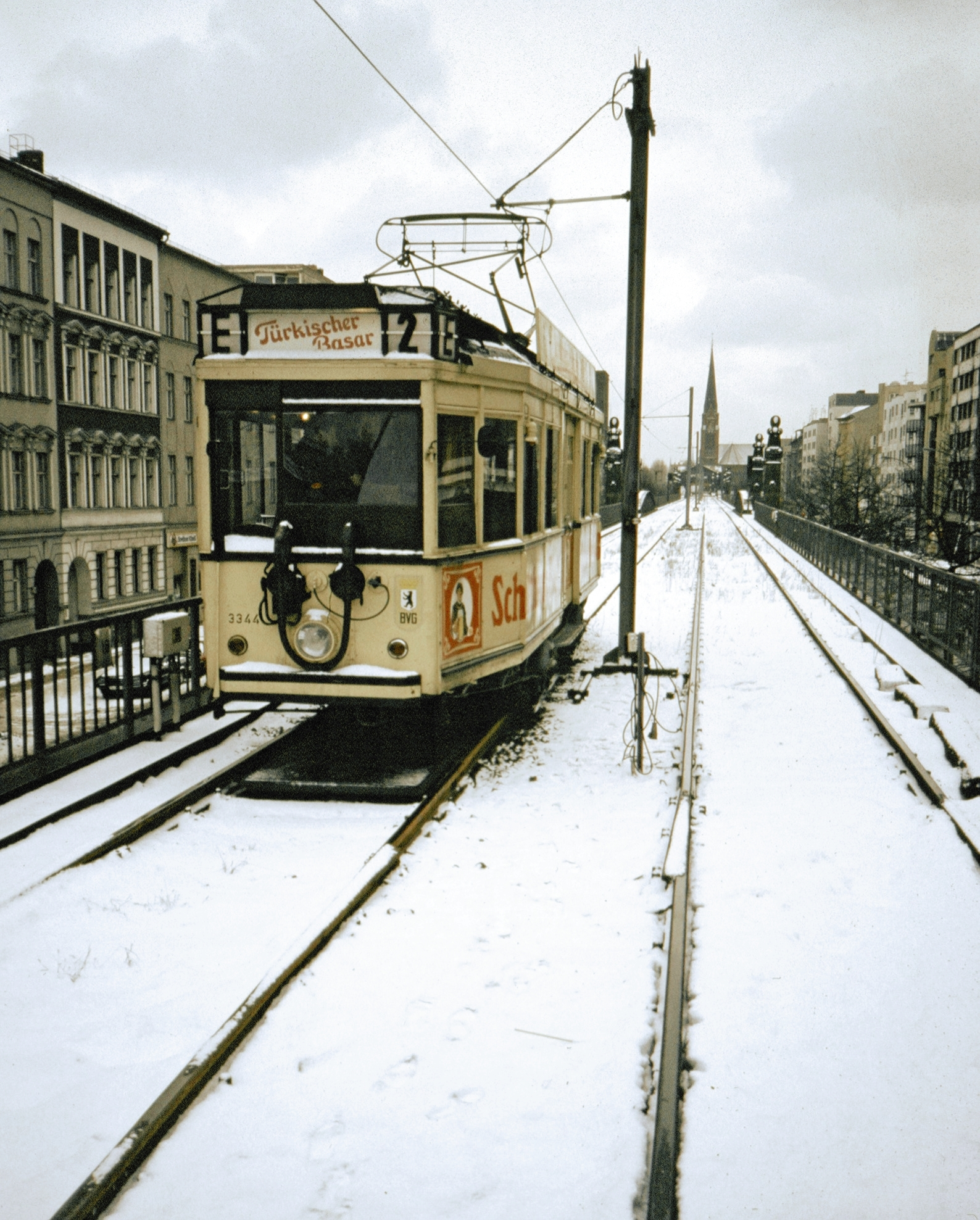 Museumsstraßenbahn auf der Hochbahntrasse am Nollendorfplatz in Berlin